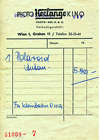 an diese Rechnung kann ich mich erinnern, habe sie selbst ausgestellt..